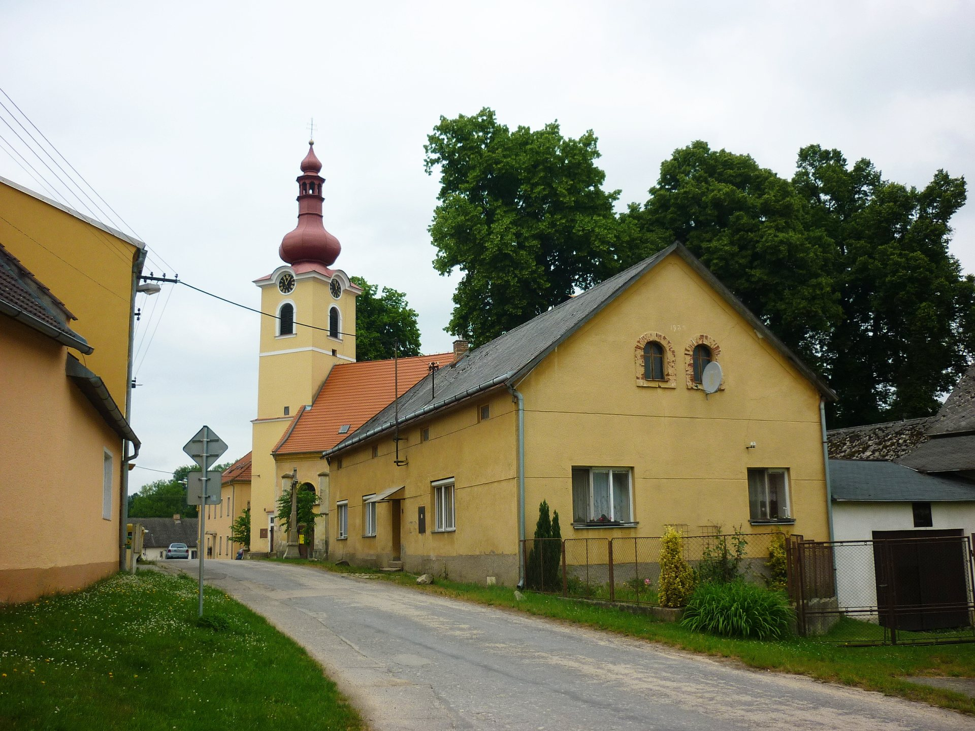 Horní Pěna - kostel sv. Michala